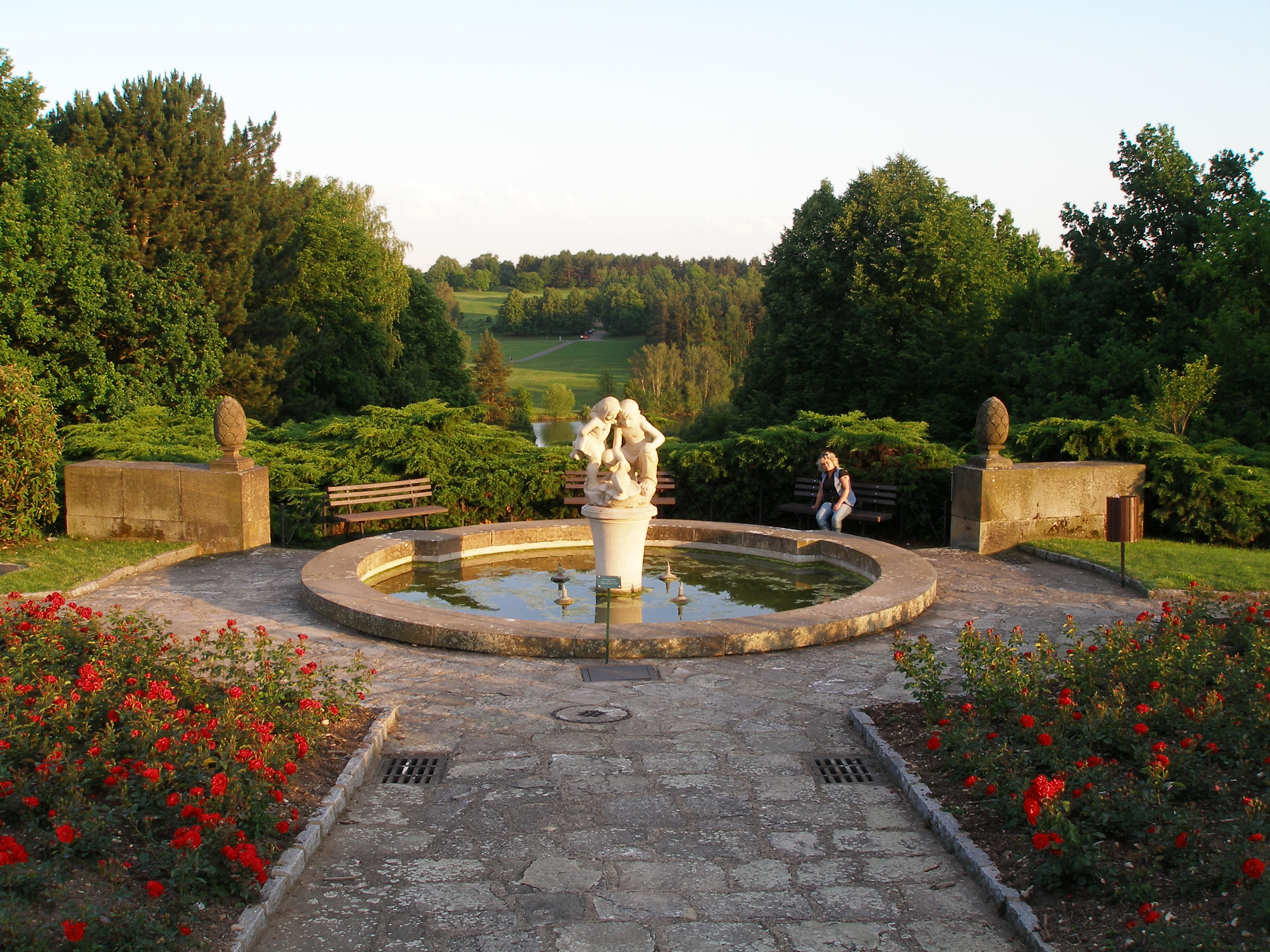 Fontána v lidickém Růžovém parku.